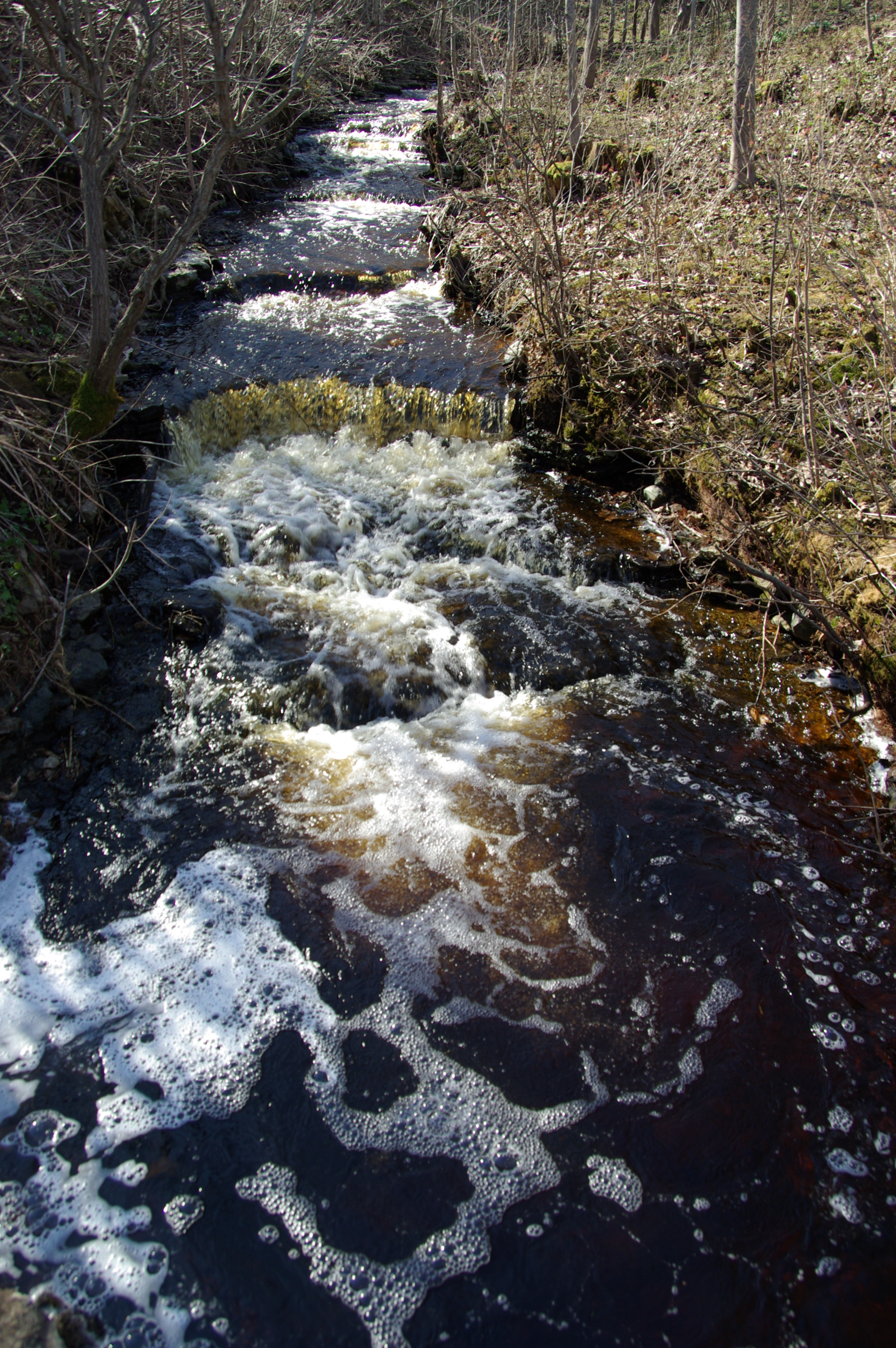 Kõrtsialuse juga asub Aseri vallas, Kõrtsialuse külas